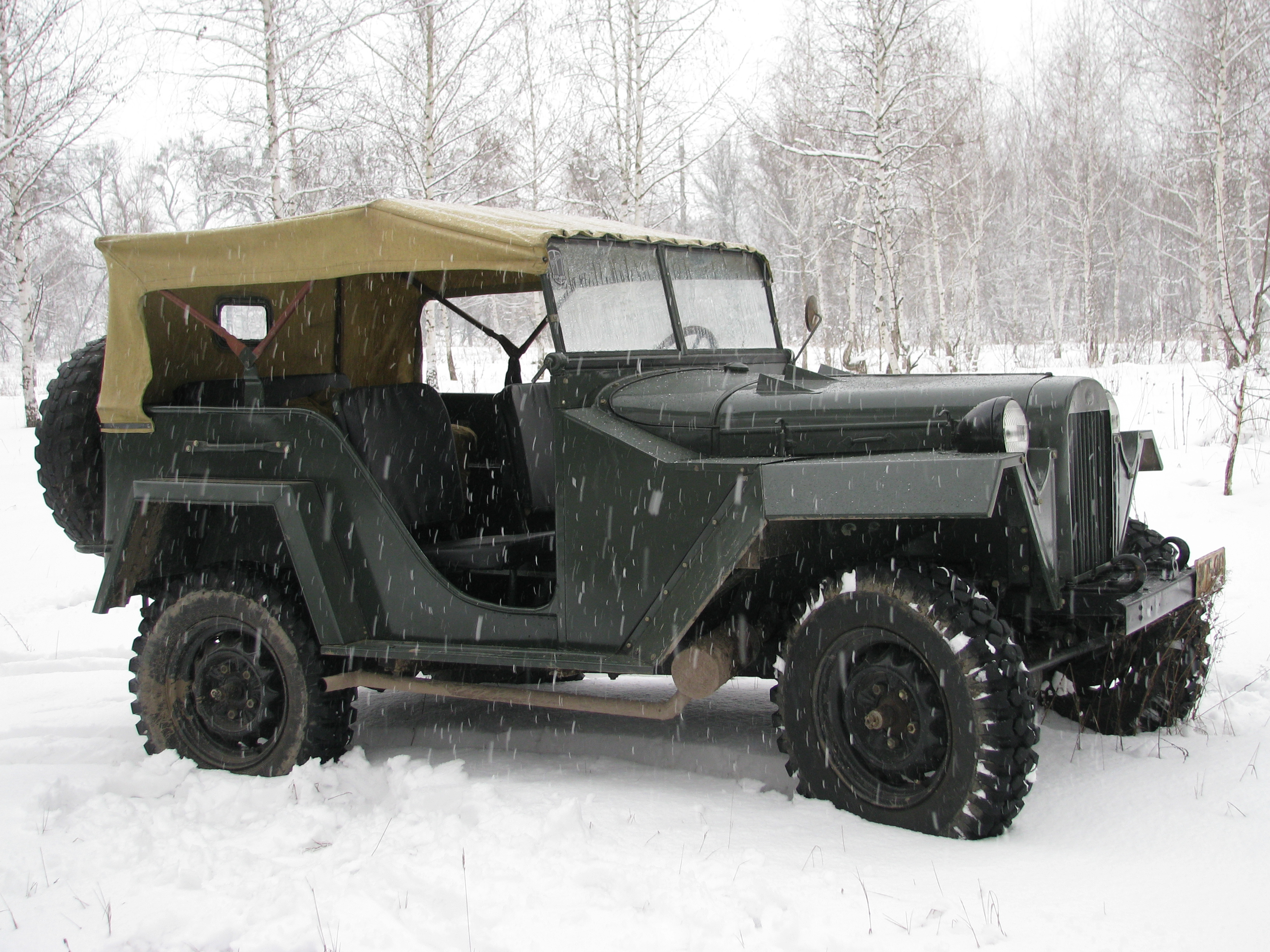 ГАЗ-67 недалеко от Харькова